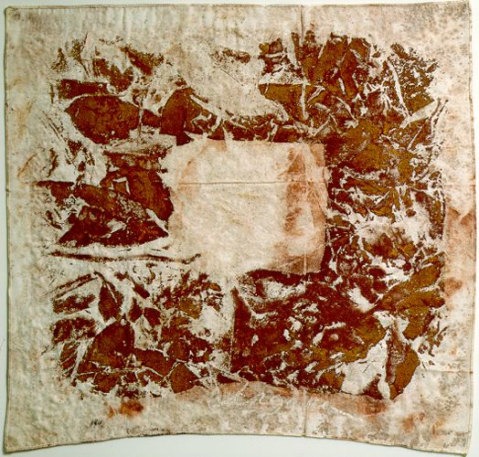 anos 90